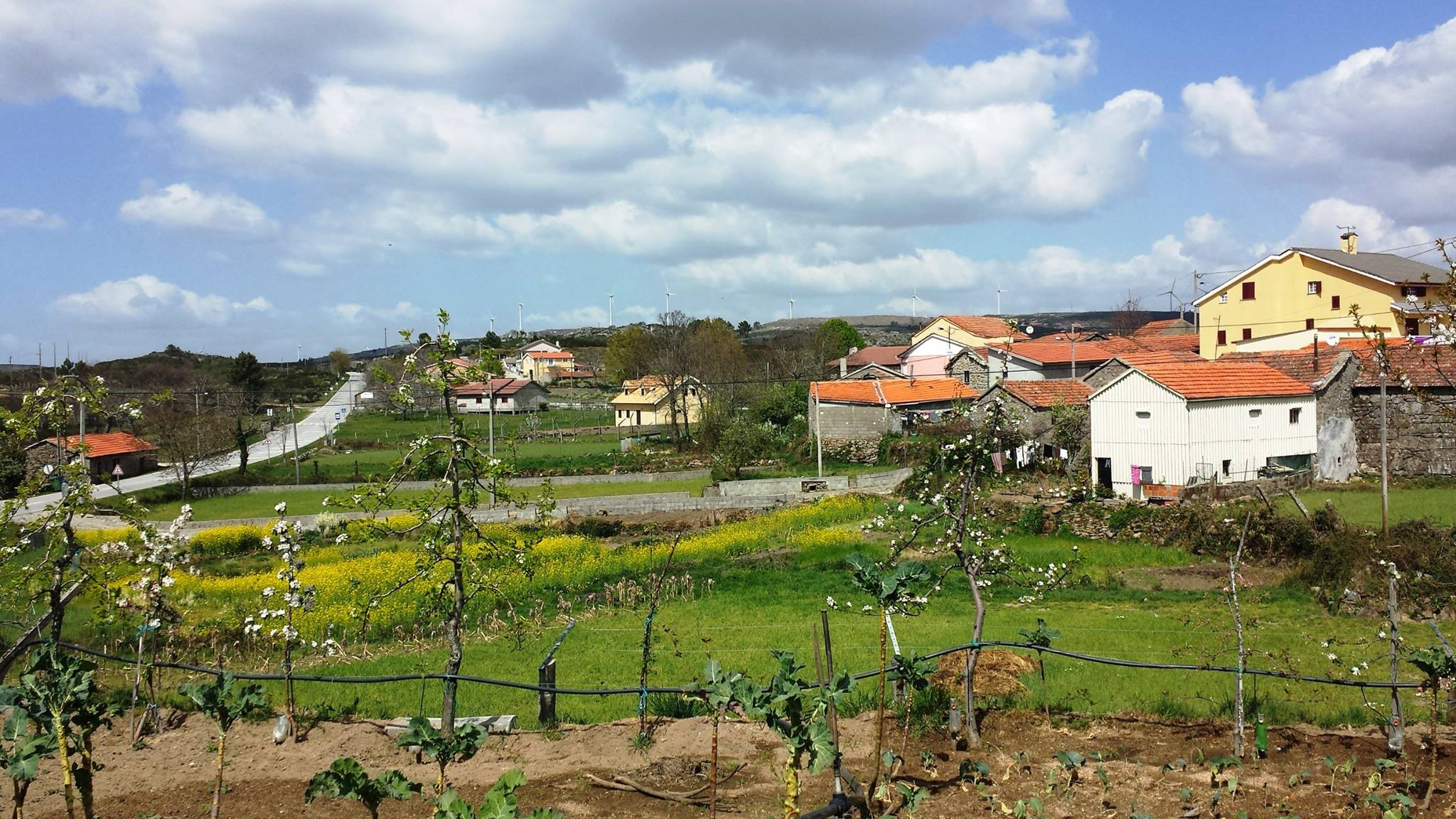 Vista parcial da aldeia